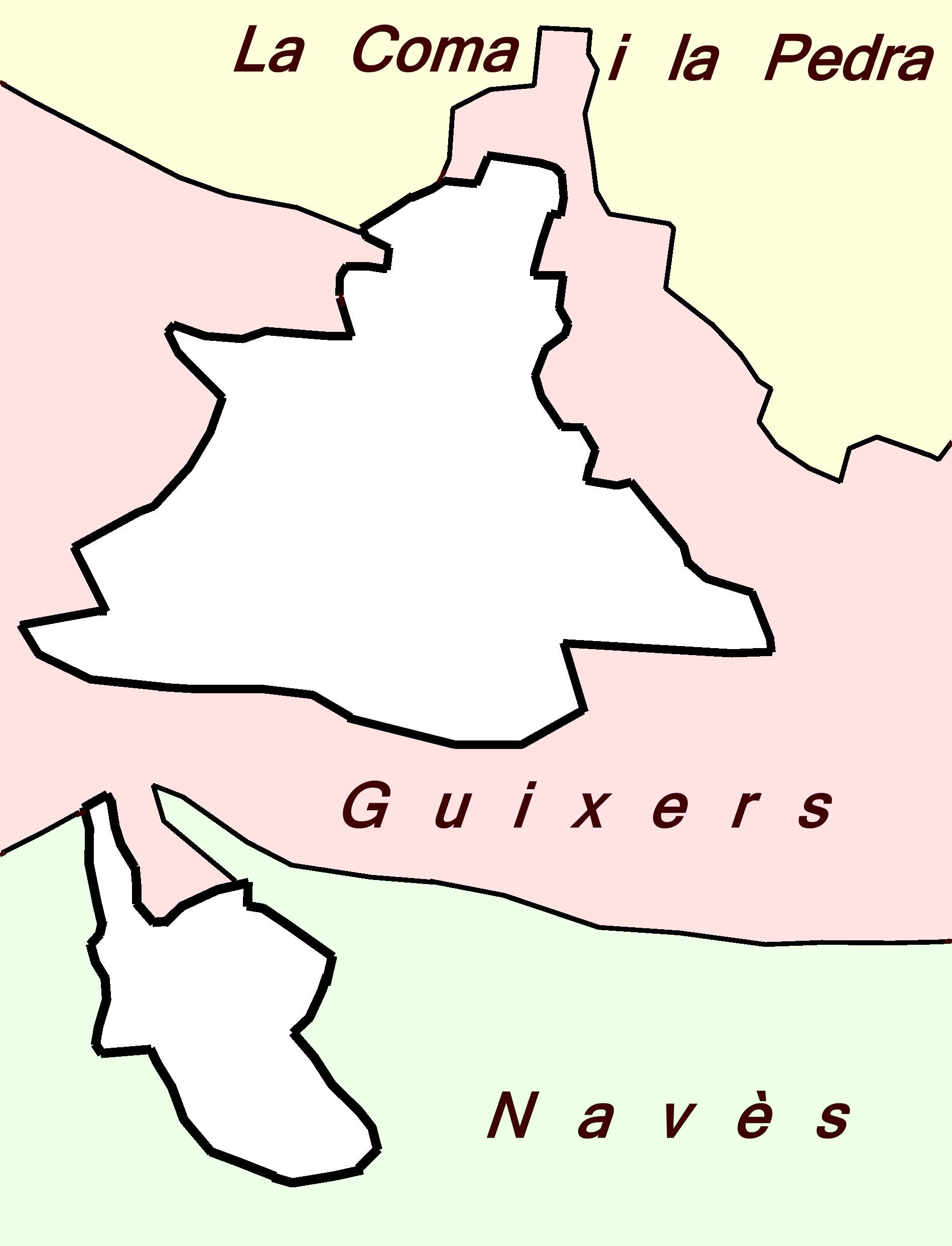 Mapa del municipi de Sant Llorenç de Morunys (Solsonès) amb els municipis limítrofes.